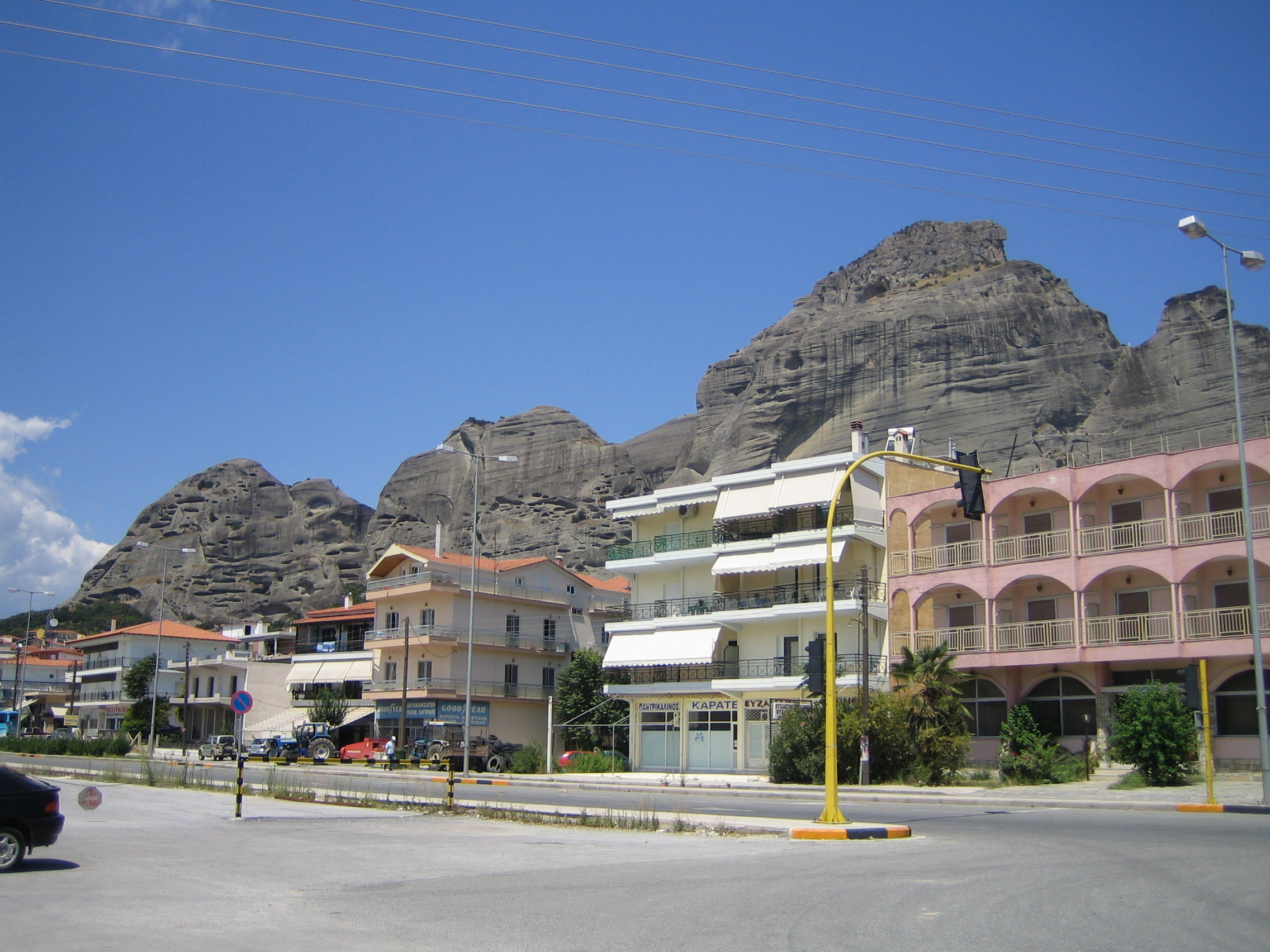 Kalabaka w Grecji, Kalampaka (Kalambaka)in Greece